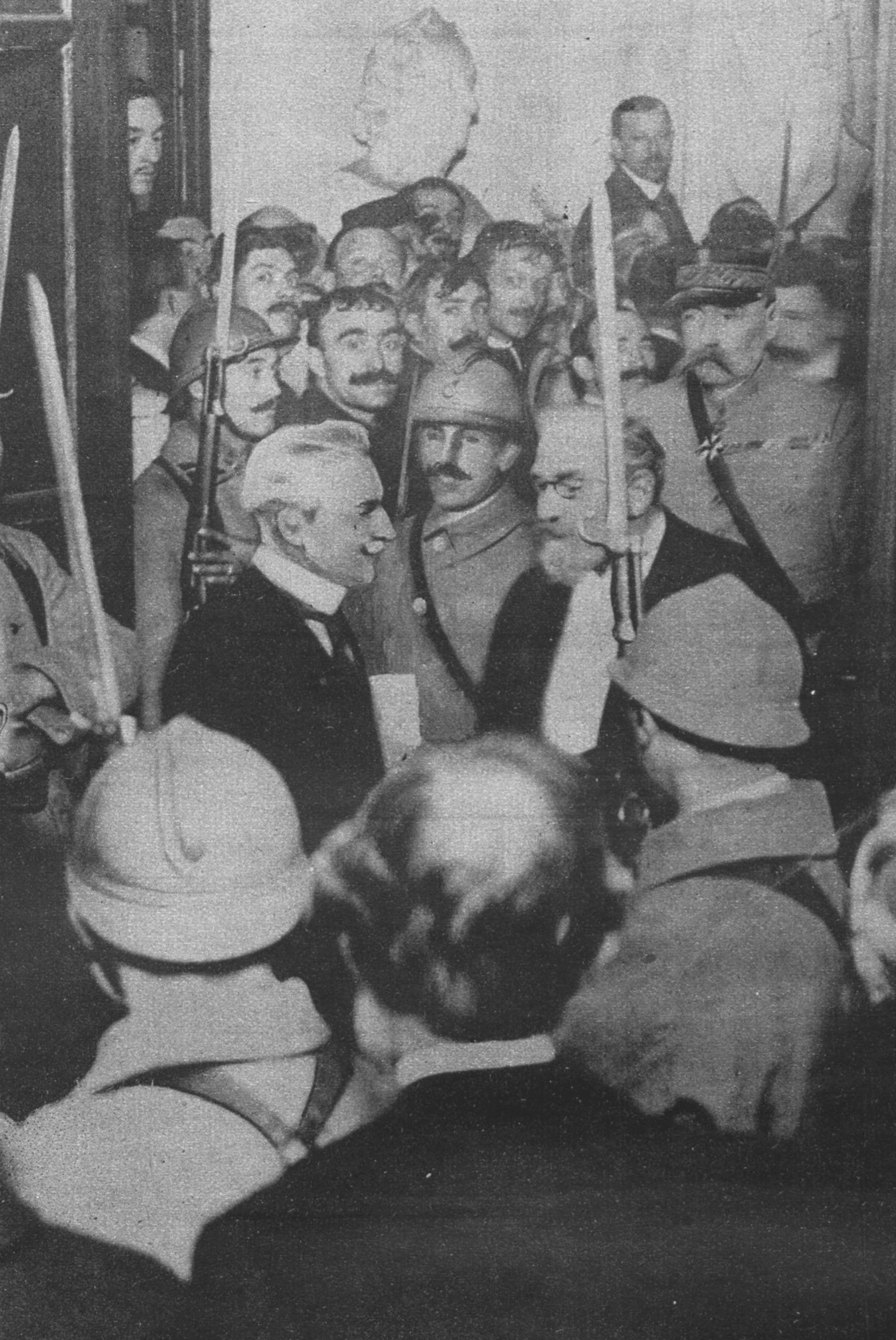 Au château de Versailles : félicitations du président du Sénat, Léon Bourgeois (à droite), au président de la République nouvellement élu, Paul Deschanel (à gauche).